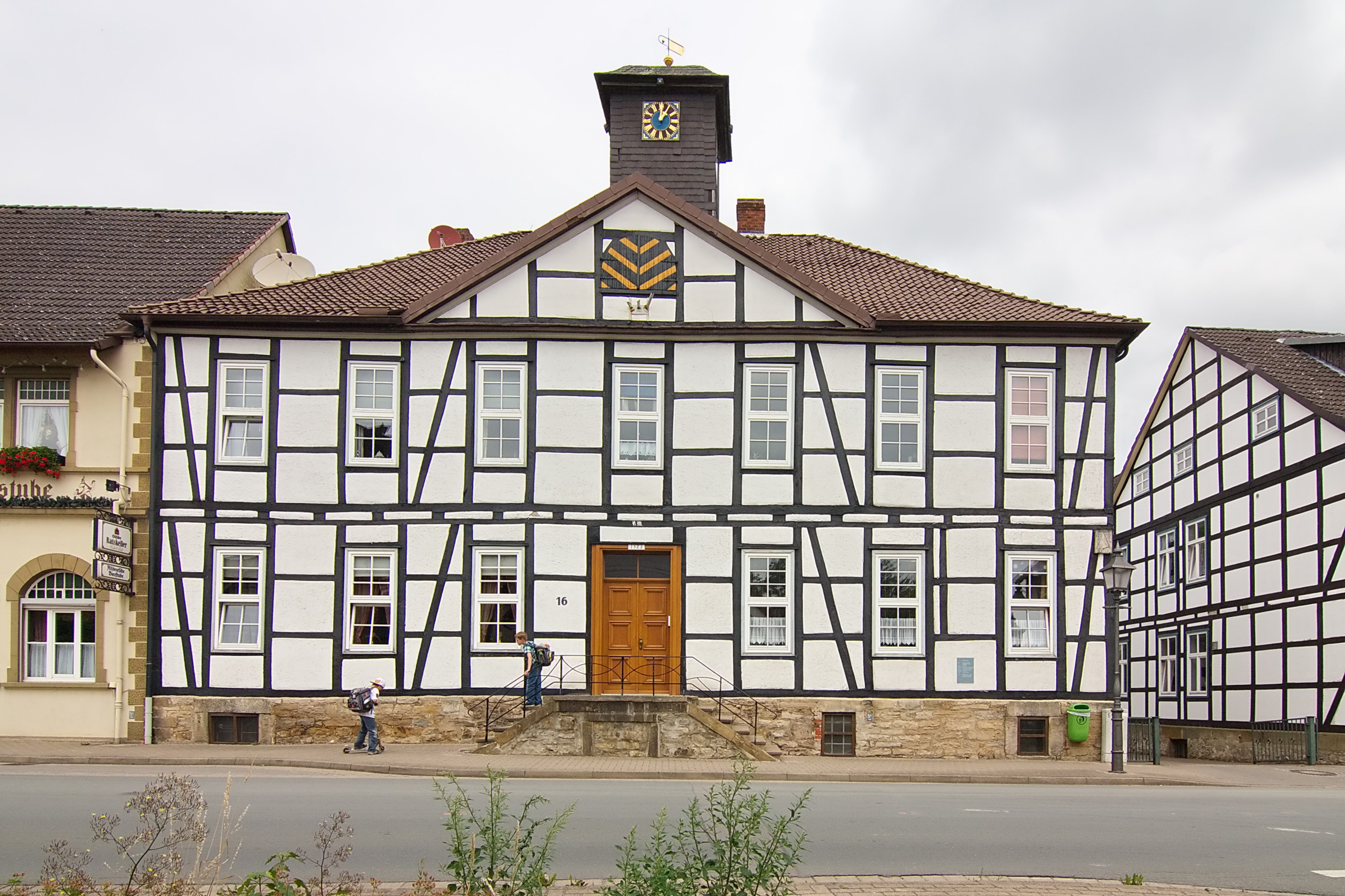 Ratskeller von 1825 in der Marktstraße 16 in Lauenau, Niedersachsen, Deutschland.